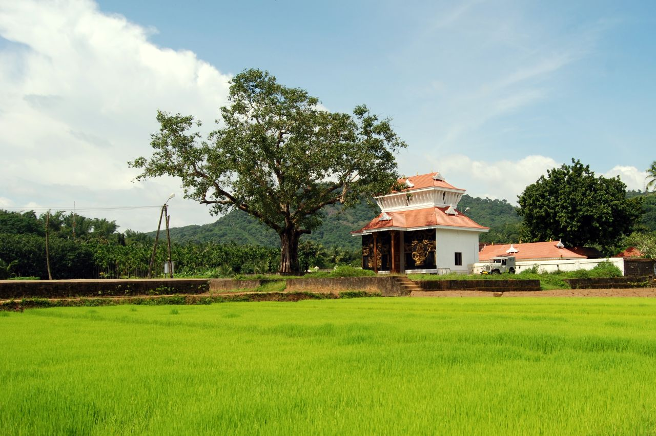 Uthralikkavu - Wadakkancheri ഉത്രാളിക്കാവ്